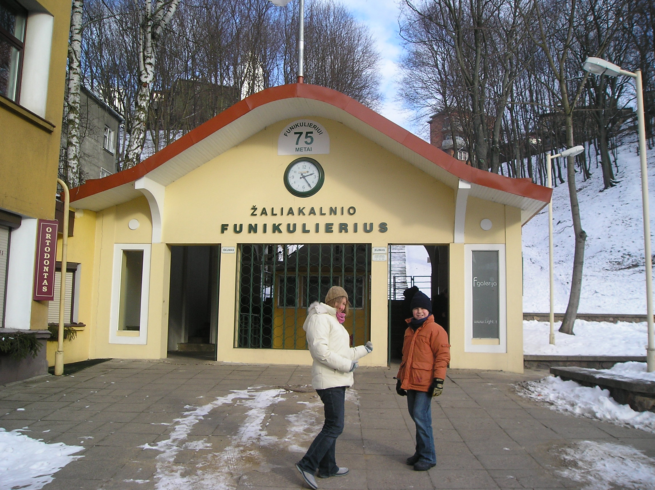 Stewart Ward